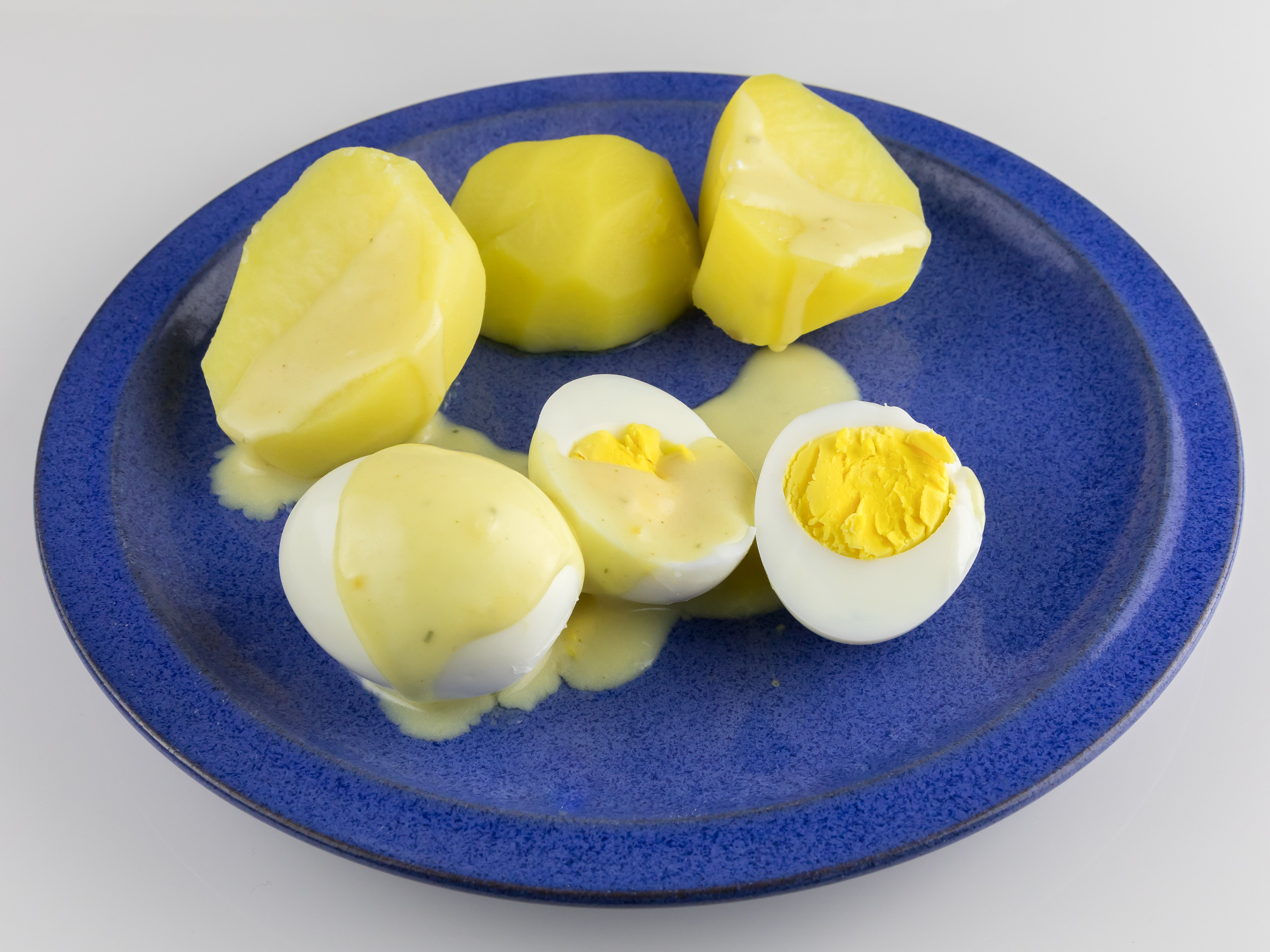 Eier mit Senfsoße und Kartoffeln auf blauem Teller